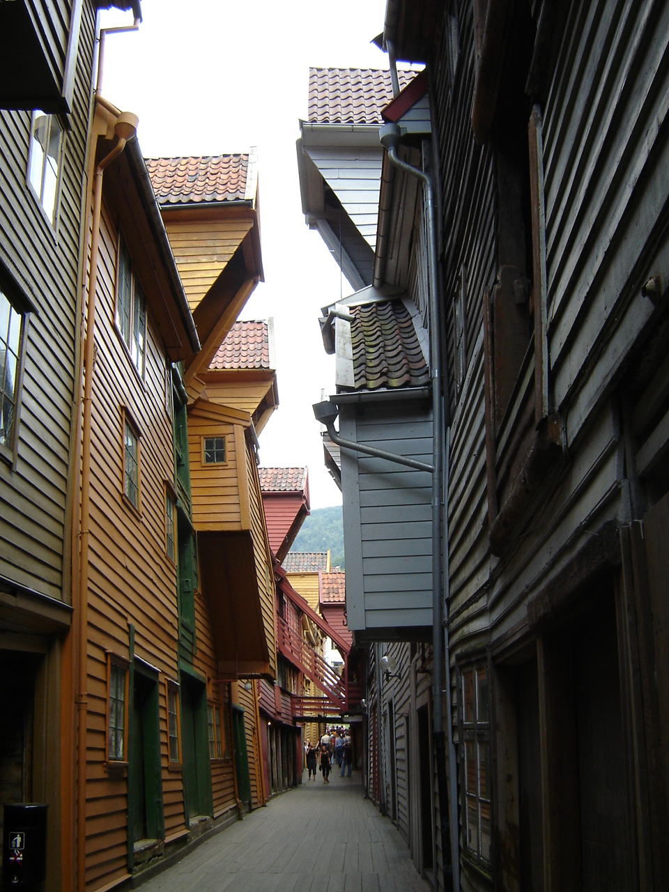 Bryggen in Bergen